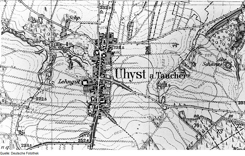 Original image description from the Deutsche Fotothek Burkau-Uhyst a. Taucher. Meßtischblatt, 1:25.000, Sekt. Bischofswerda, Nr. 4851 (RA Görlitz 30/38)